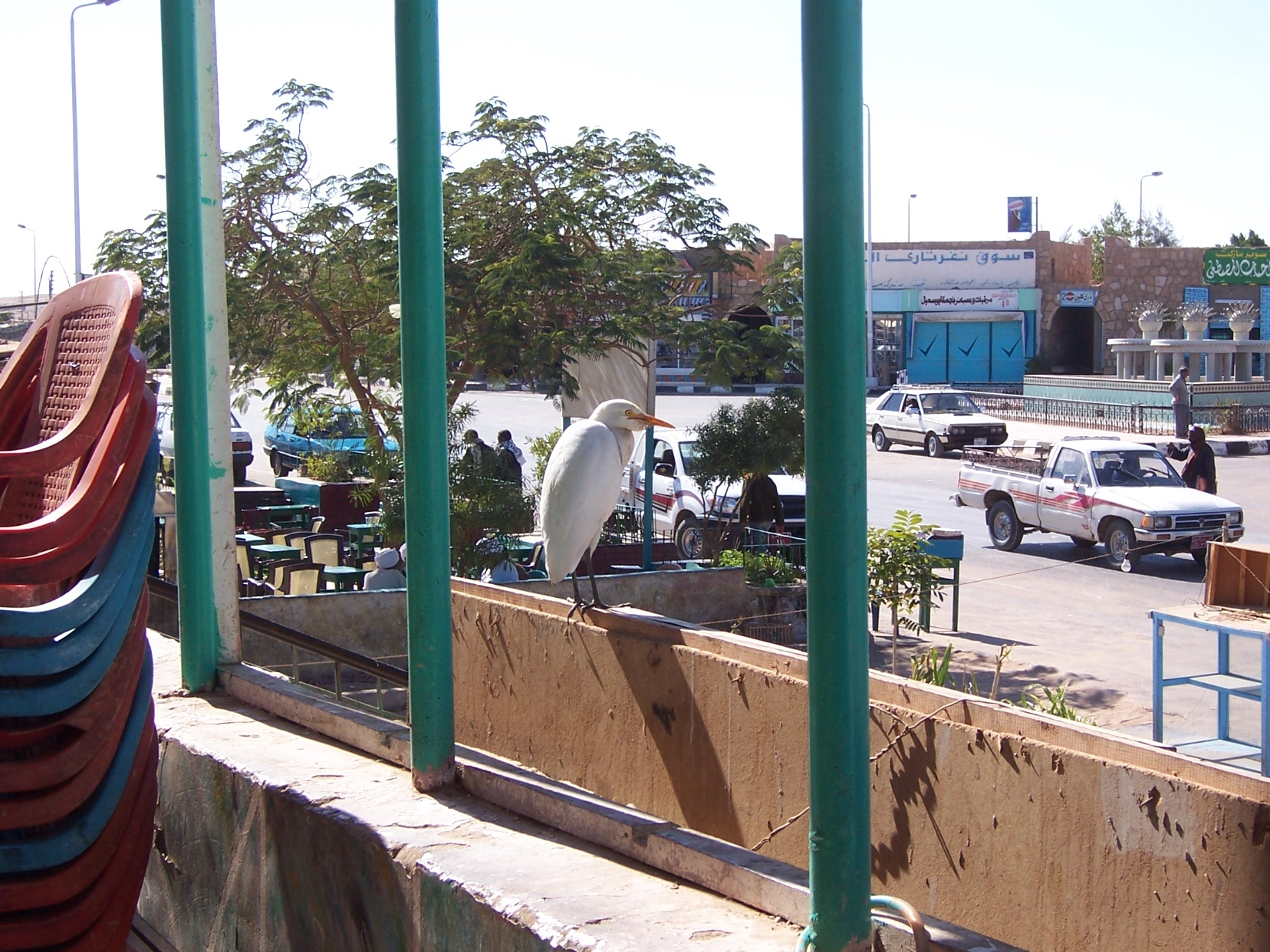 Ancient Temples at Abu Simbel, Egypt